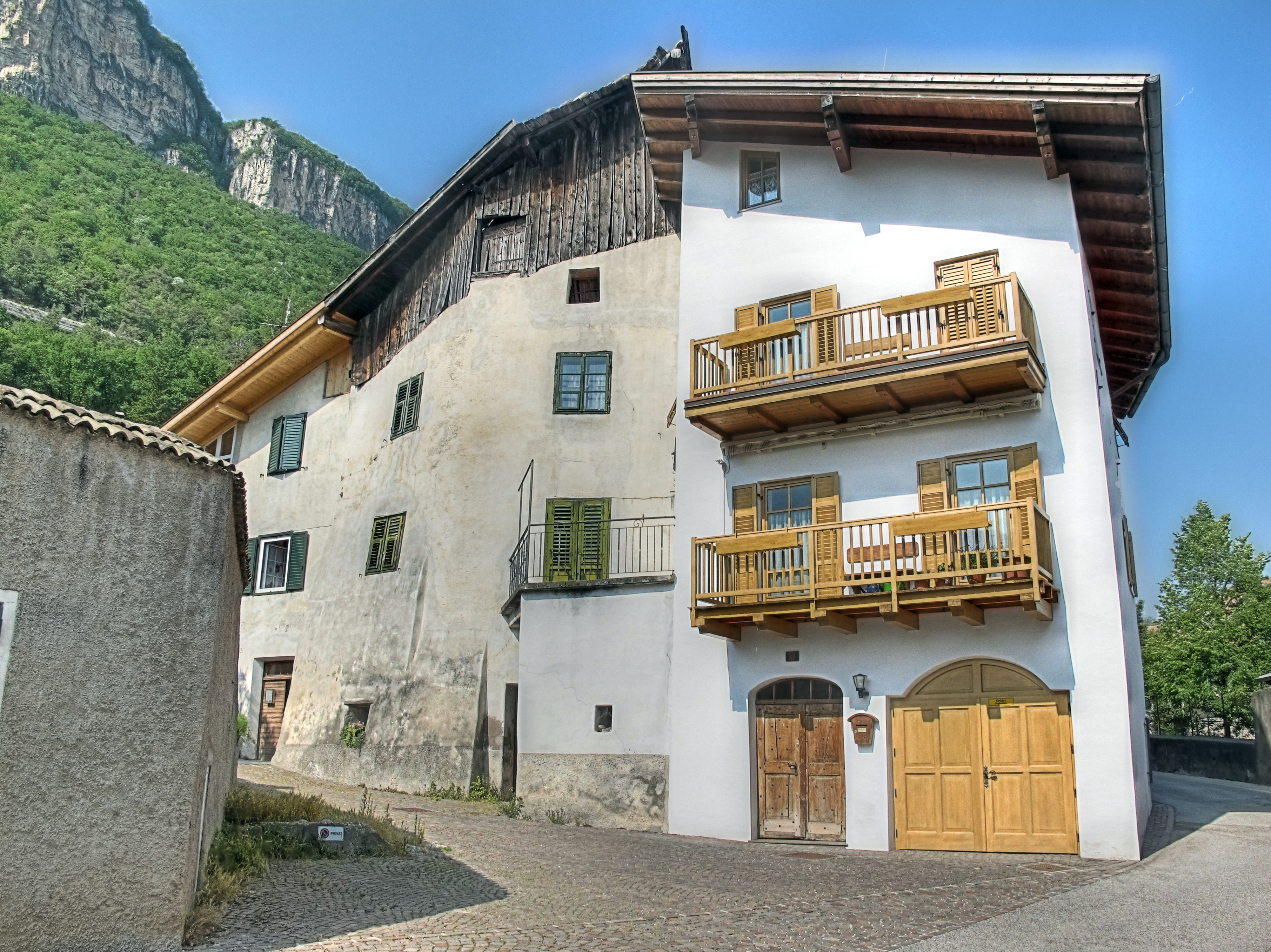 Italien, Südtirol, Kurtatsch an der Weinstraße, Bauernhof, HDR-Image